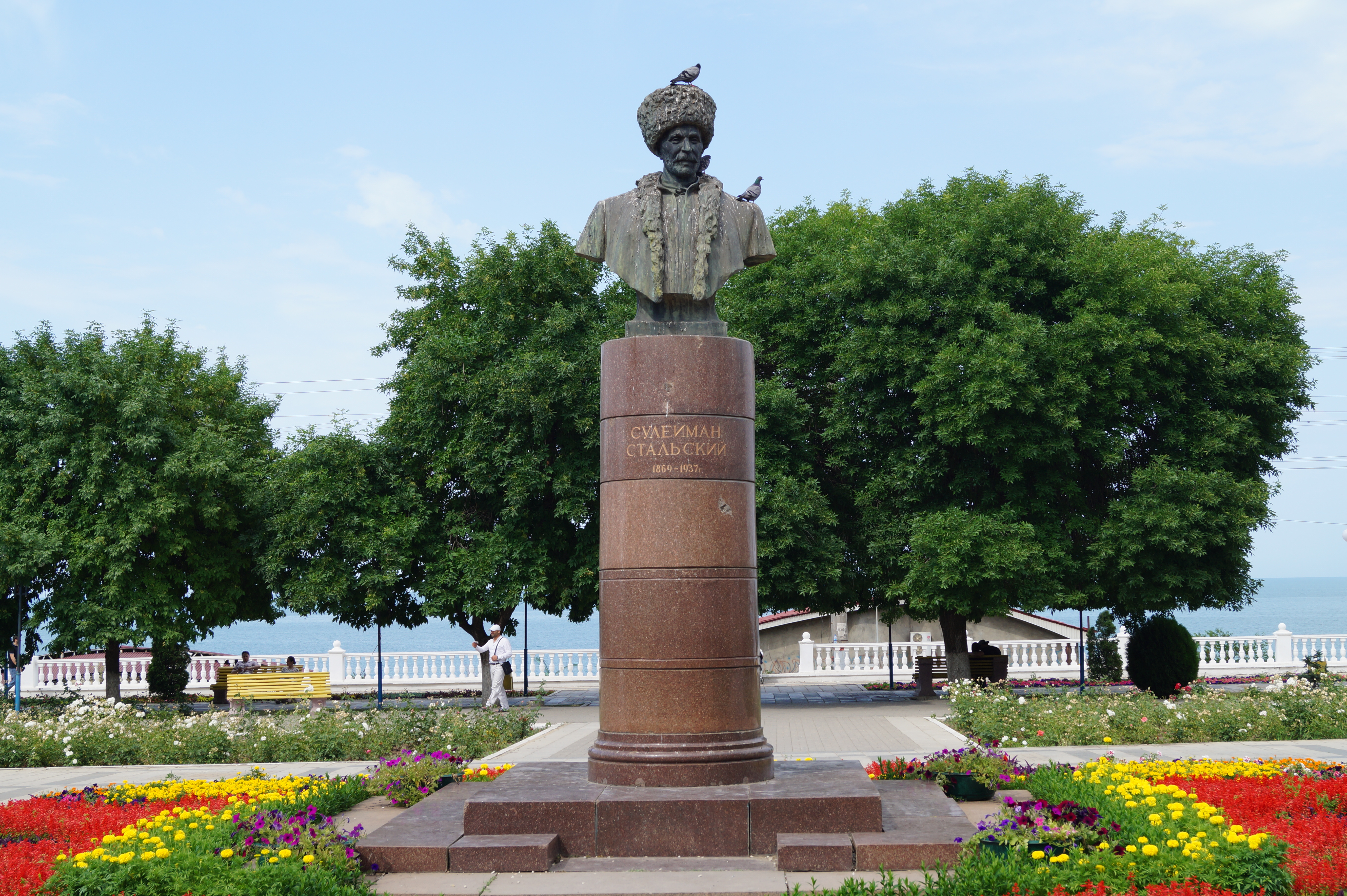 Могила поэта Стальского Сулеймана (1869-1937 гг.): сквер Сулеймана Стальского, Махачкала, Дагестан